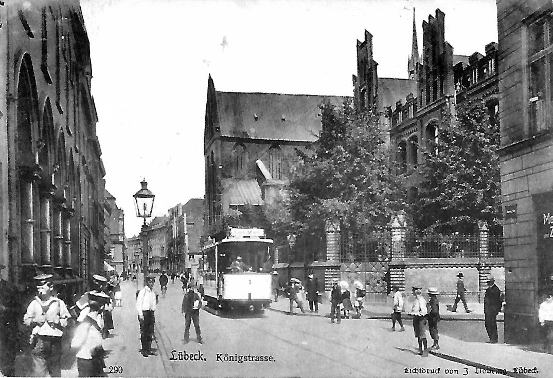 Die Postkarte zeitgt die Königstraße von der Hundestraße aus gesehen. Ihr Poststempel trägt das Datum 13. Dezember 1911